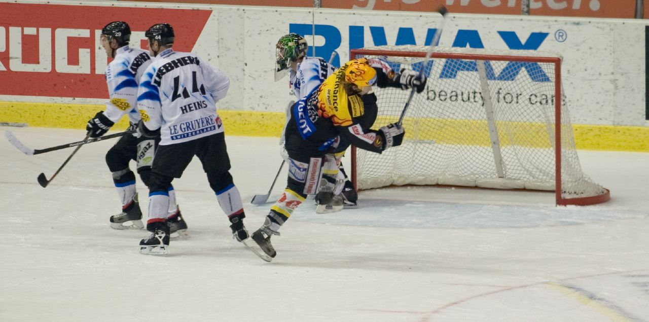 Simon Gamache (SC Bern gegen Fribourg-Gottéron)